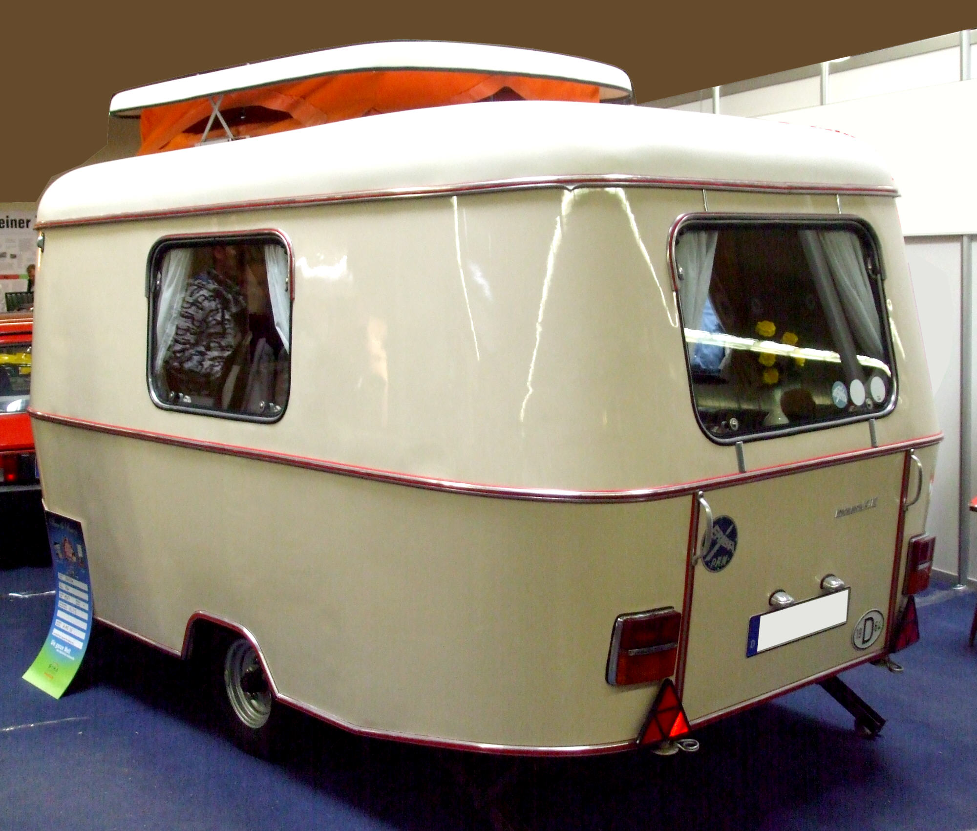 Eriba Wohnwagen „Pan“ , Baujahr 1964, bei der Technoclassica 2007